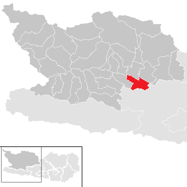 Bezirk Spittal an der Drau